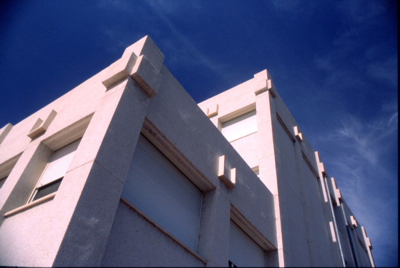 Edificio Filologías de la Universidad de La Rioja.